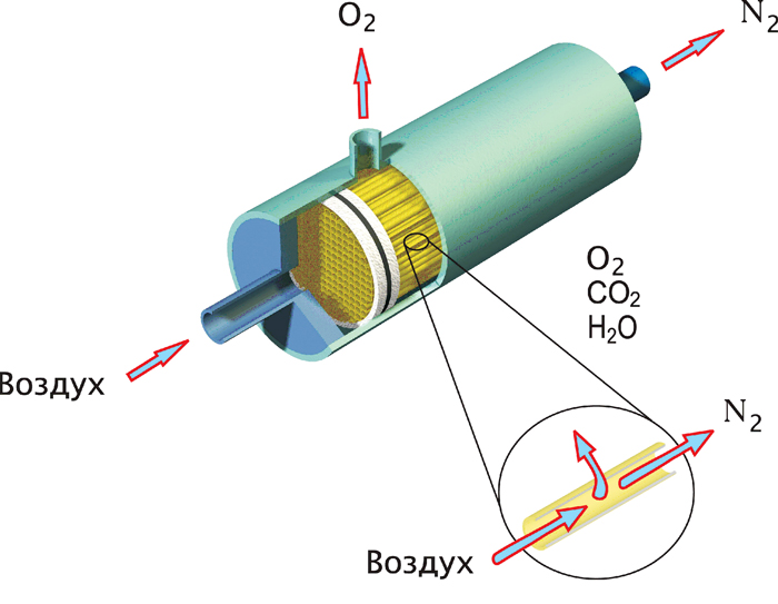 Мембр-картридж